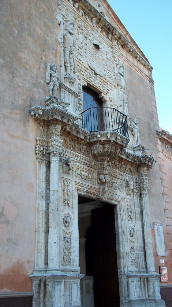 Portal de la Casa de Montejo en Mérida, Yucatán, México en enero de 2012.